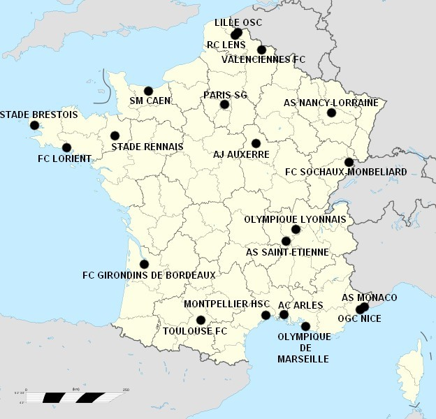 Ligue 1 Equipes 2010-2011